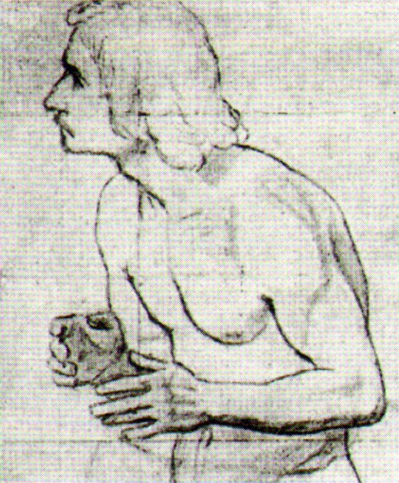 А А Иванов, эскиз фигуры дрожащего отца - Н. В. Гоголь